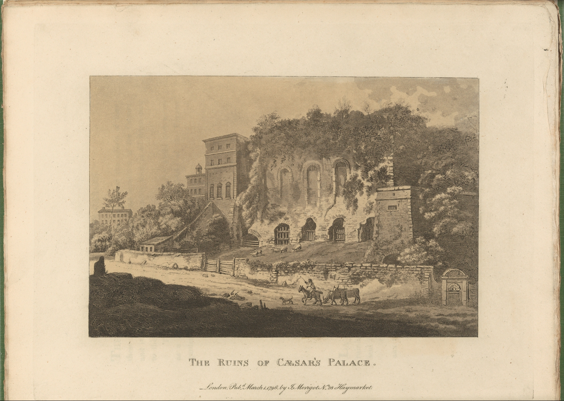 Book; Books